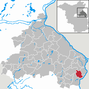 Podelzig in Brandenburg (Country) - District Märkisch-Oderland